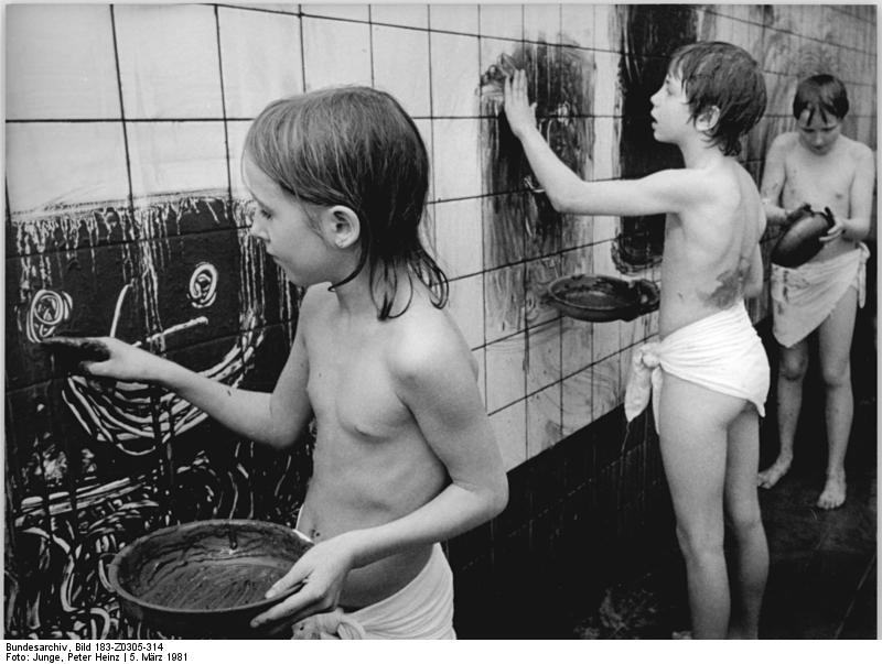 Berlin, Charité, Maltherapie ADN-ZB Junge erd-5.3.81-Berlin: Psychische Schäden bei Kindern und Jugendlichen rechtzeitig zu erkennen und zu behandeln, ist das Anliegen des Jugendgesundheitsschutzes, psychologischer Beratungsstellen, psychiatrischer Polikliniken und Nervenkliniken. An der Kinderpsychiatrischen Abteilung der Nervenklinik der Berliner Charité wird mit Hilfe der Mal- und Schmiertherapie (Foto) und anderer Maßnahmen versucht, kindliche funktionelle Störungen (Neurosen) zu beeinflußen. Etwa 80 bis 90 Kinder werden jährlich in dieser Abteilung erfolgreich behandelt. Spontanes Malen und Schmieren ermöglicht es den Patienten, unbewußte Spannungen und Ängste zu reflektieren. Die Verwendung von bestimmten Farben und Motiven kann dem Therapeuten Einblick in die akute seelische Situation des Kindes geben und ihm bei der weiteren Behandlung helfen. Nicht wenige der Geschädigten in der DDR sind psychisch geschädigt. Historisch entstandene Vorurteile gegenüber diesem Personenkreis gilt es, durch Aufklärungsarbeit weiter abzubauen.